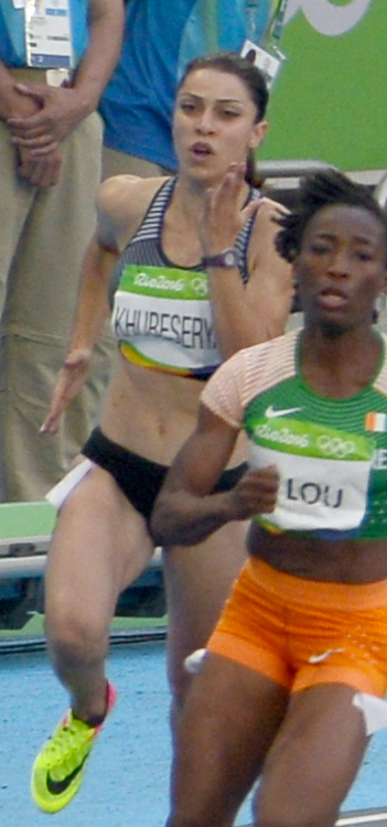 4ème Série du 200m féminin de Rio 2016